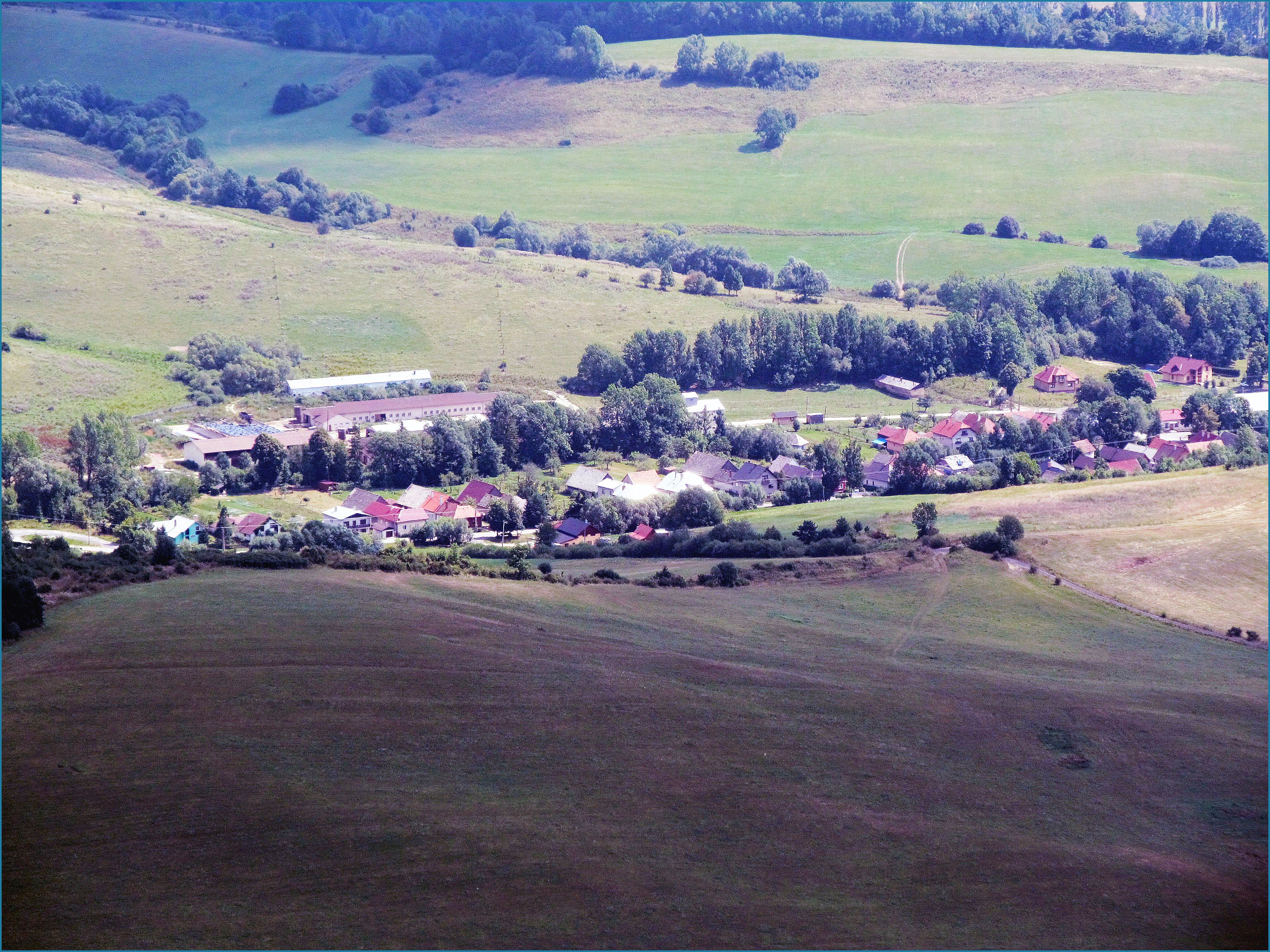 Výhľad na Liptovskú Annu